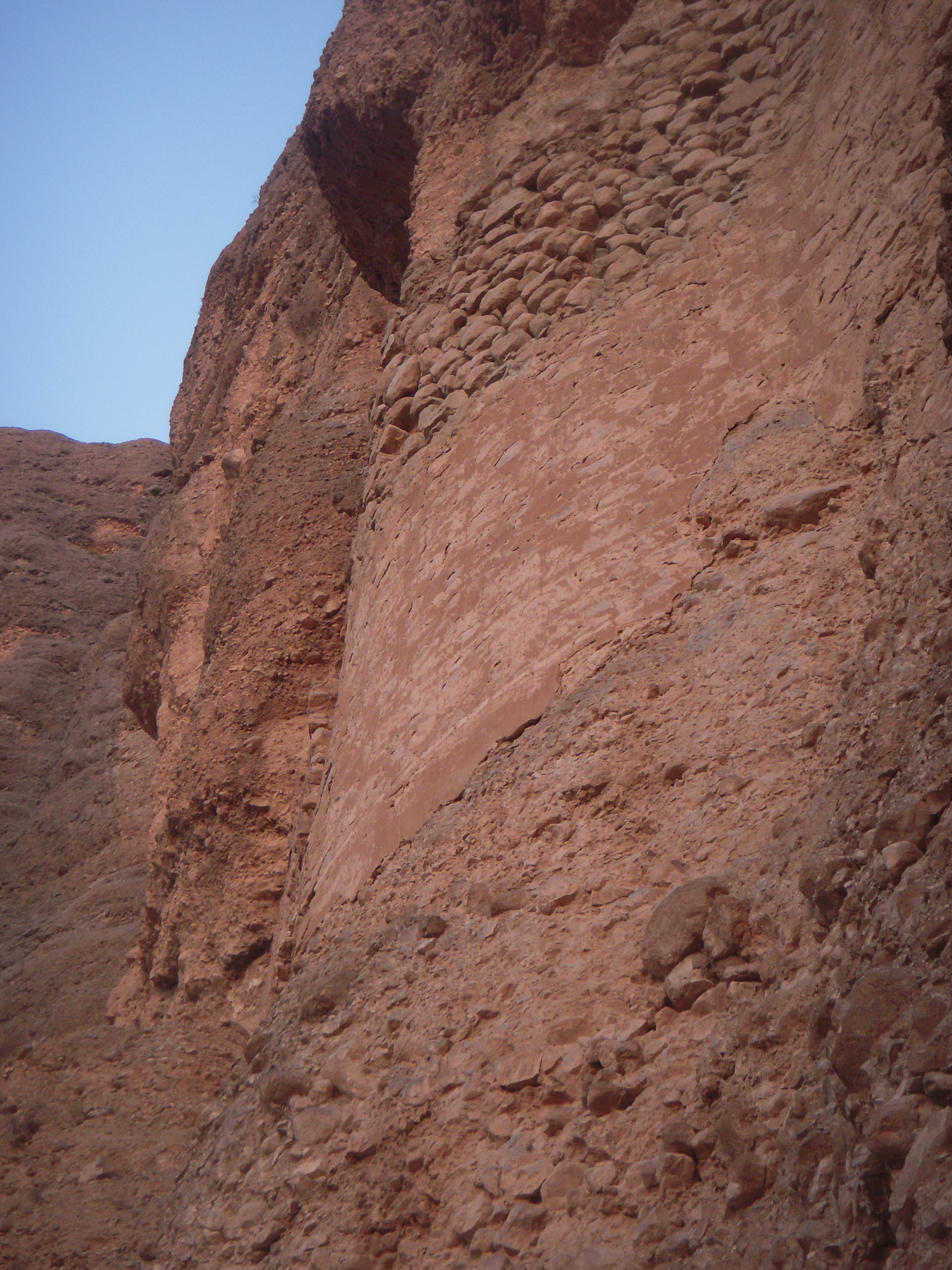 دژ شمس کلایه